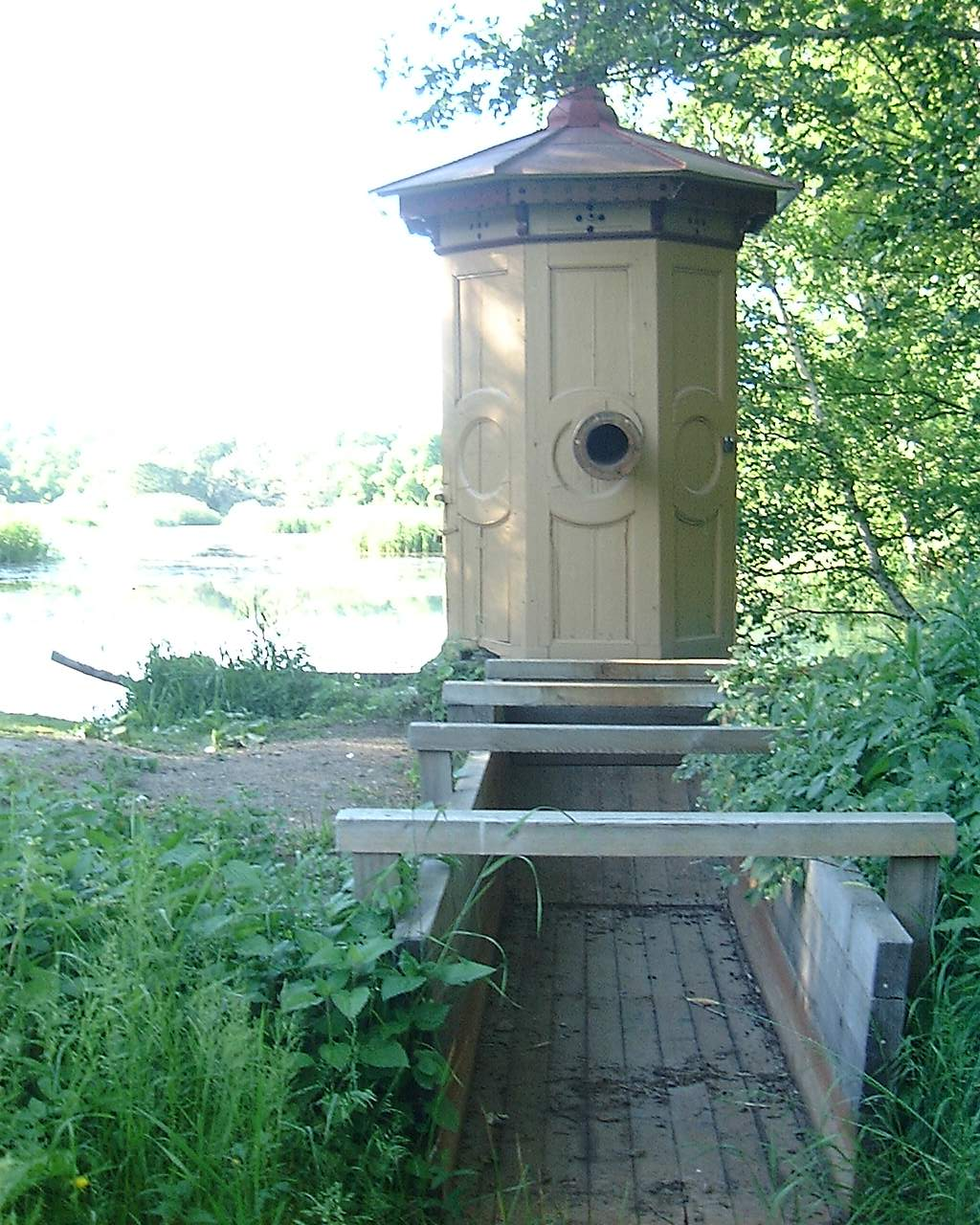 Isbladskärret, Djurgården, Stockholm.